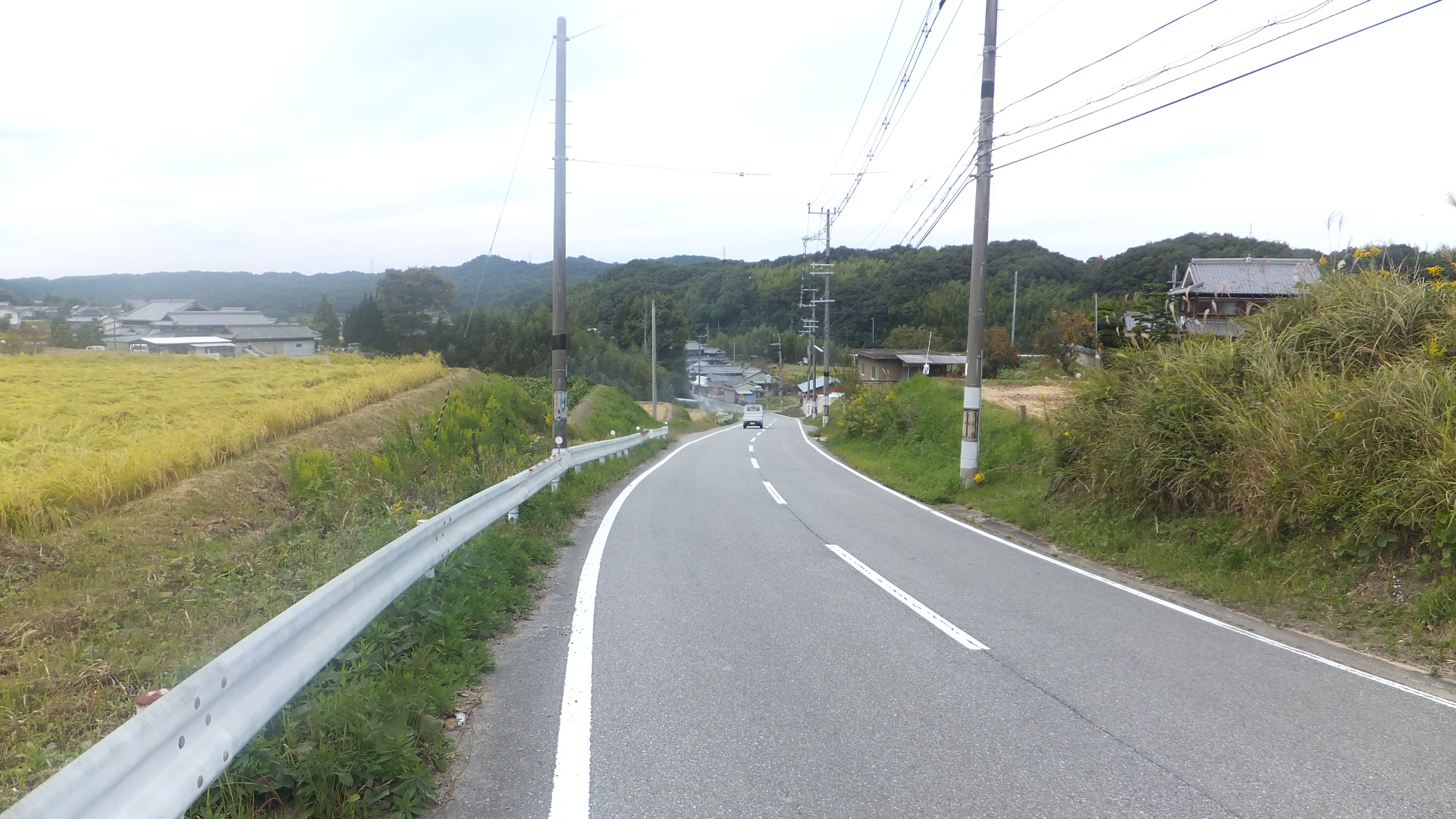 兵庫県三木市細川町瑞穂 兵庫県道144号西脇口吉川神戸線